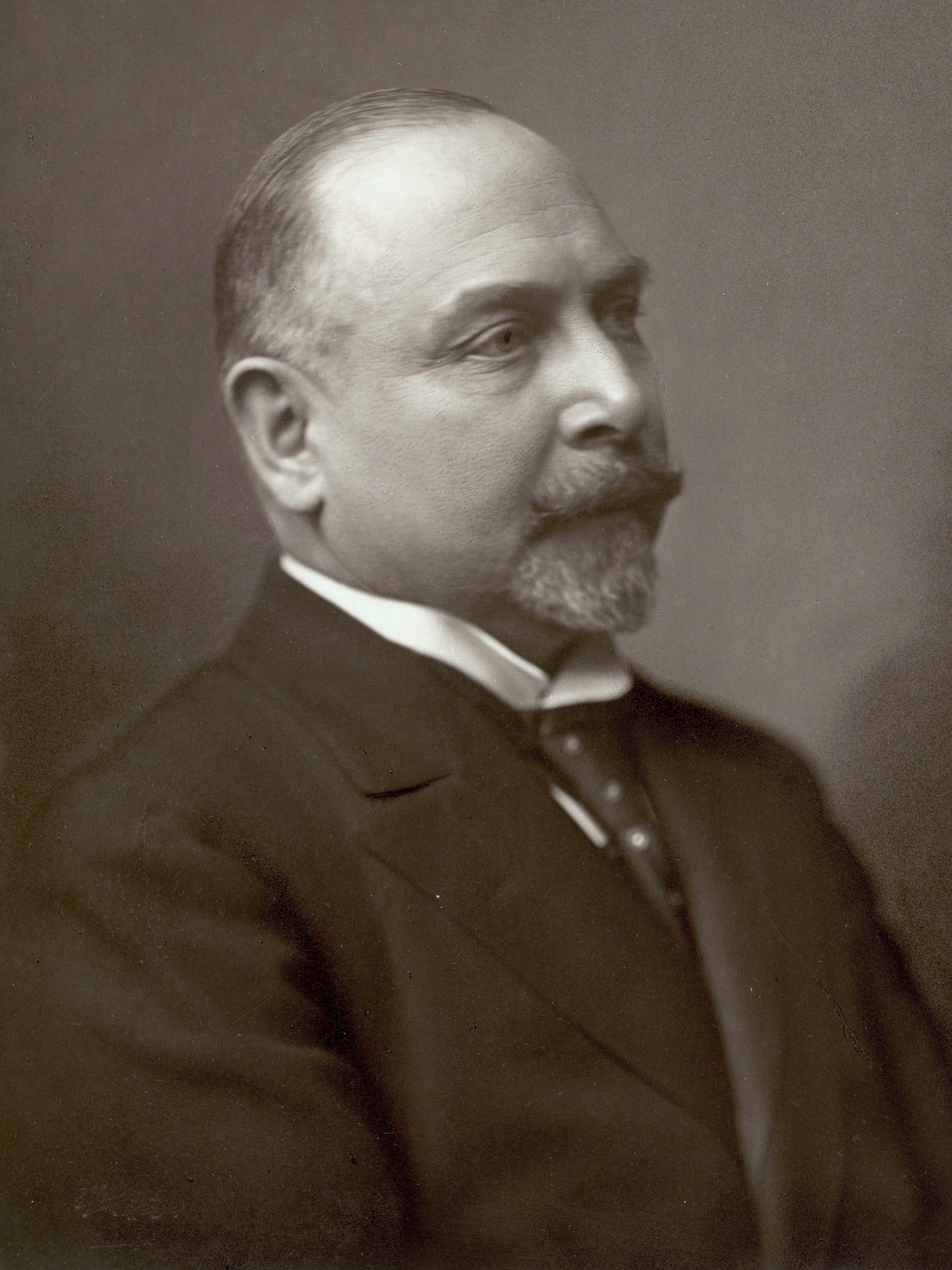 Carl Theodor Zahle (født 19. januar 1866, død 3. februar 1946), dansk konseilspræsident fra 28. oktober 1909 til 5. juli 1910 og igen fra 21. juni 1913 til 29. marts 1920. Fra 21. april 1918 tituleredes regeringschefen i Danmark statsminister.